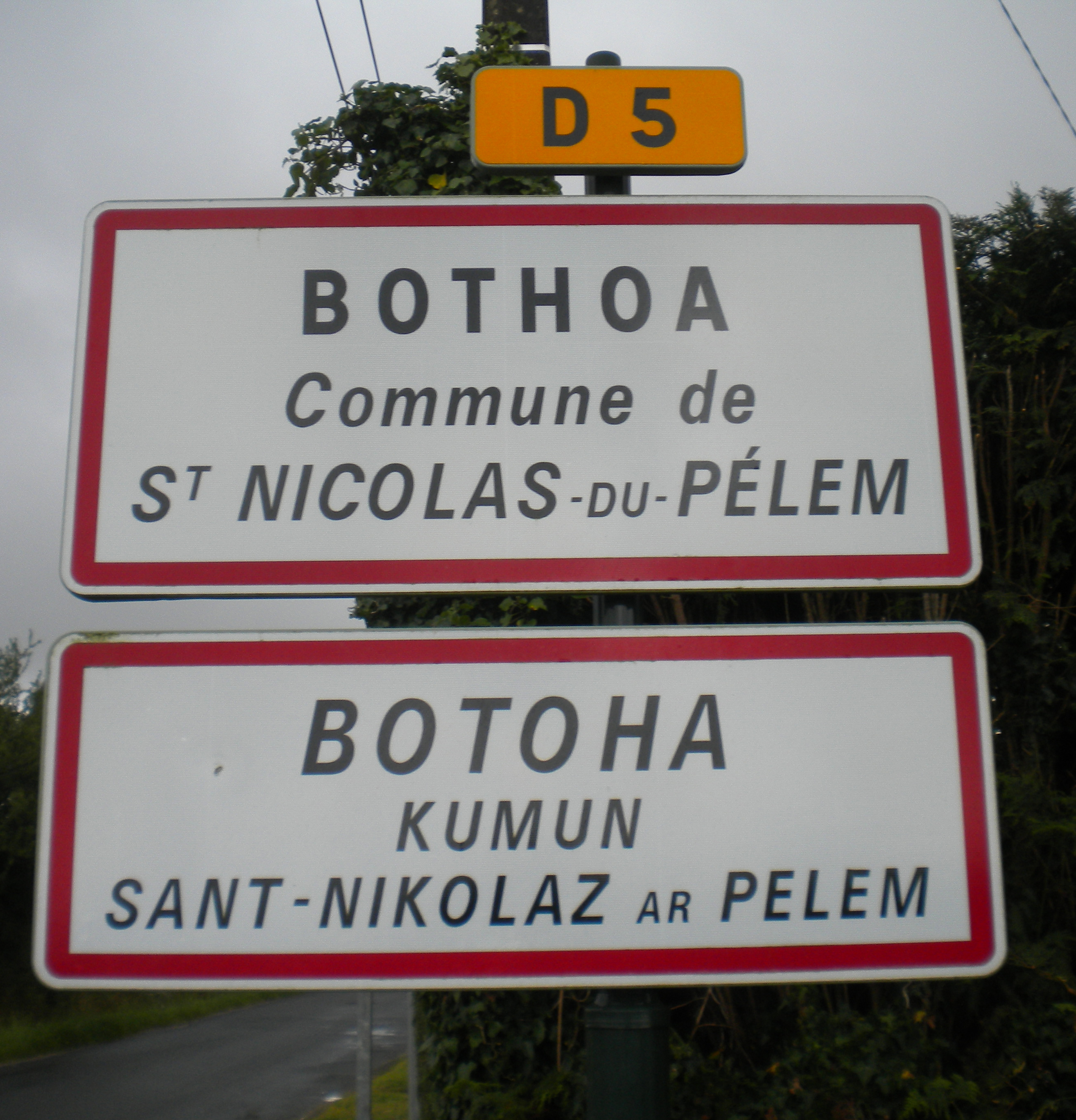 Botoha